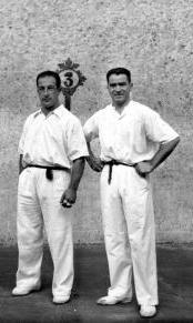 Ubilla I and Kortabitarte, in 1945